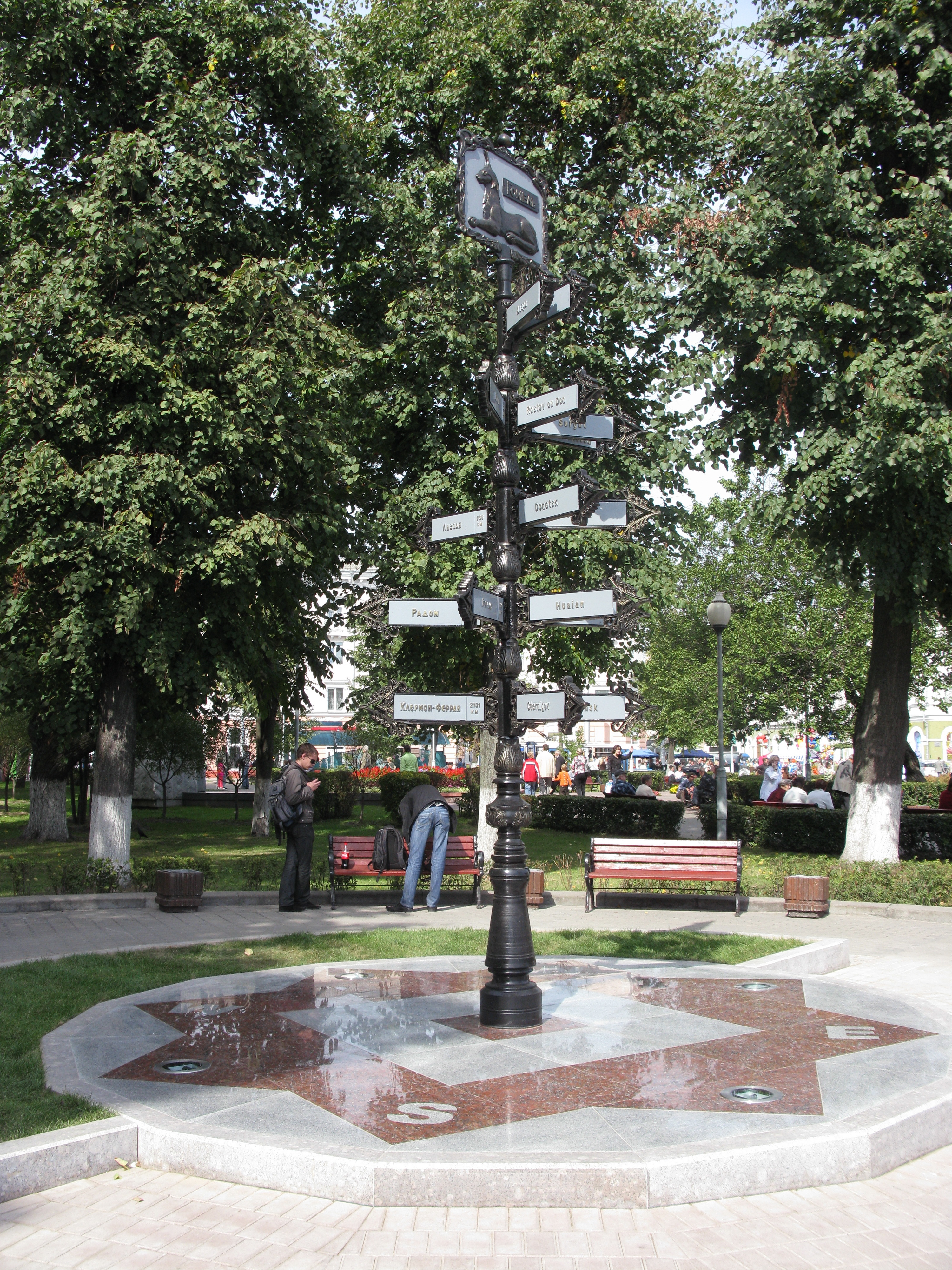 Знак городам-побратимам Гомеля.